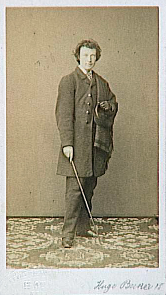 Fotografie von Ludwig Hugo Becker (1834‐1868), Arnold Overbeck, Gebr. G. & A. Overbeck in Düsseldorf